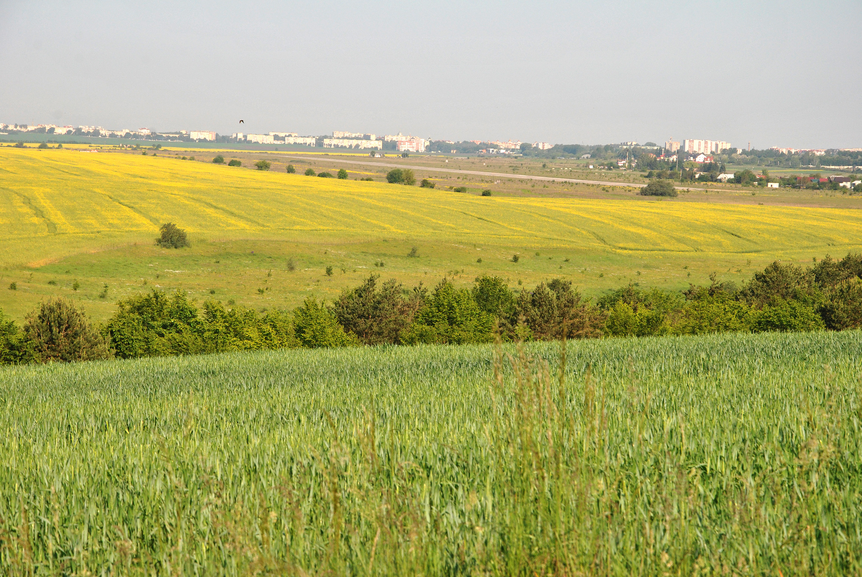 «Головачеве» — ландшафтний заказник у водно-болотному масиві між селами Смиківці, Дичків і смт Великі Бірки Тернопільського району Тернопільської області в долині р. Гніздечна.